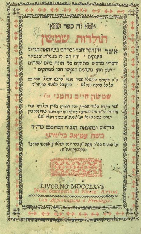 שער הספר "תולדות שמשון" מאת הרב שמשון חיים נחמני, ליבורנו, איטליה, ה'תקכ"ו, 1766